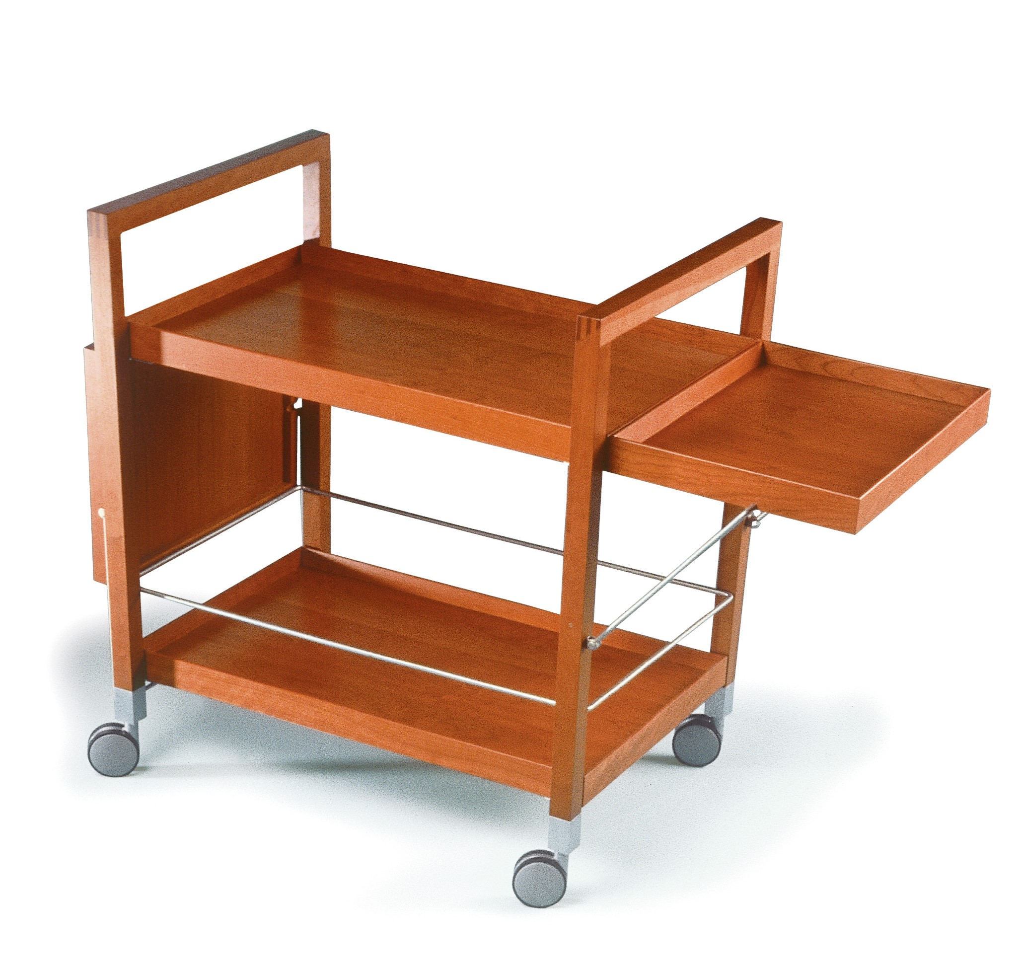 Masterpiece Teewagen Design Dieter Sieger